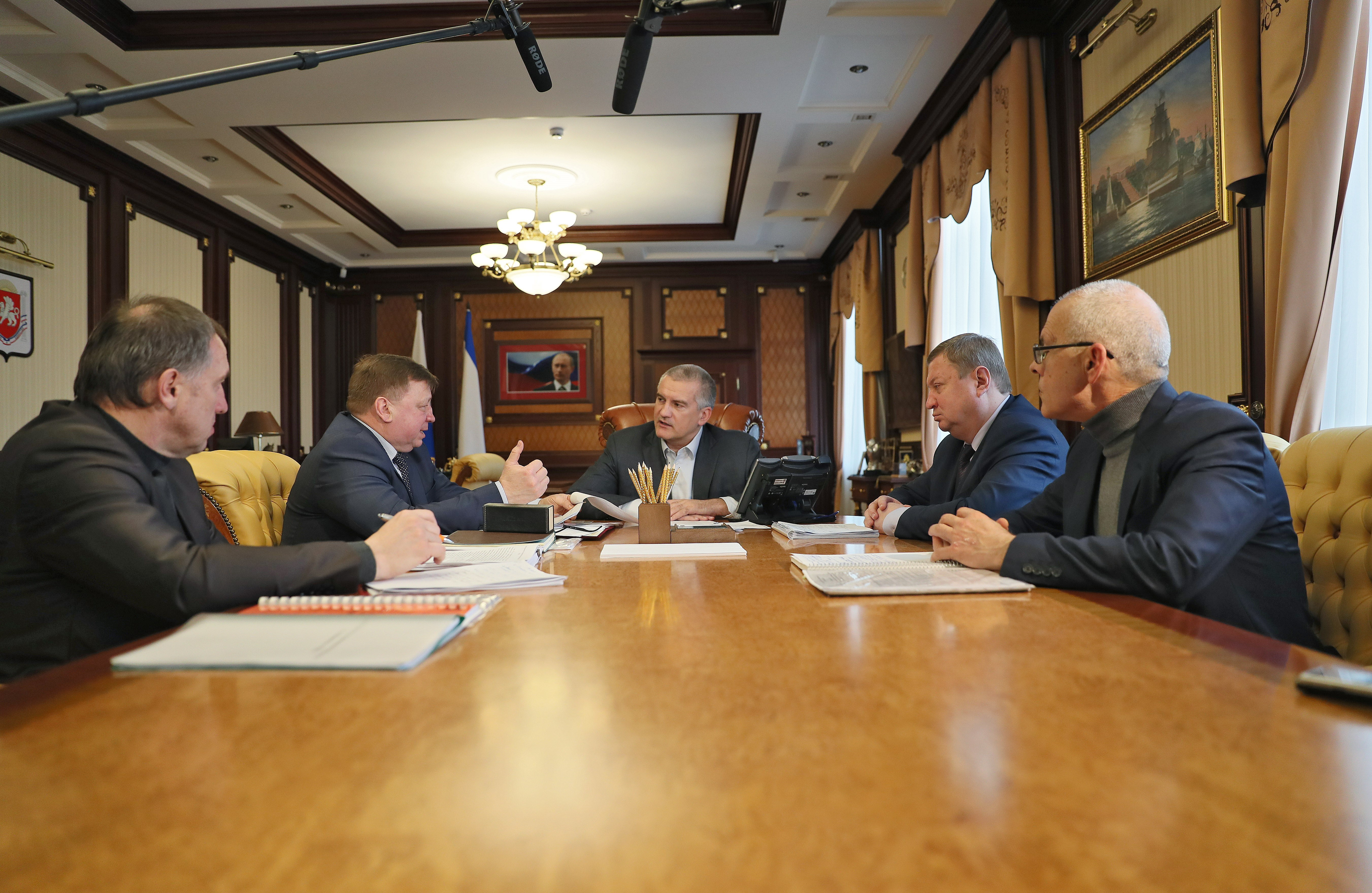 Глава Республики Крым Сергей Аксёнов провёл рабочую встречу с министром транспорта РК Игорем Захаровым, главой администрации города Симферополя Игорем Лукашевым, и его заместителем Сергеем Круцюком. В ходе встречи обсуждались вопросы оптимизации схемы движения транспорта в Симферополе, борьбы с пробками и расчета пассажиропотока.